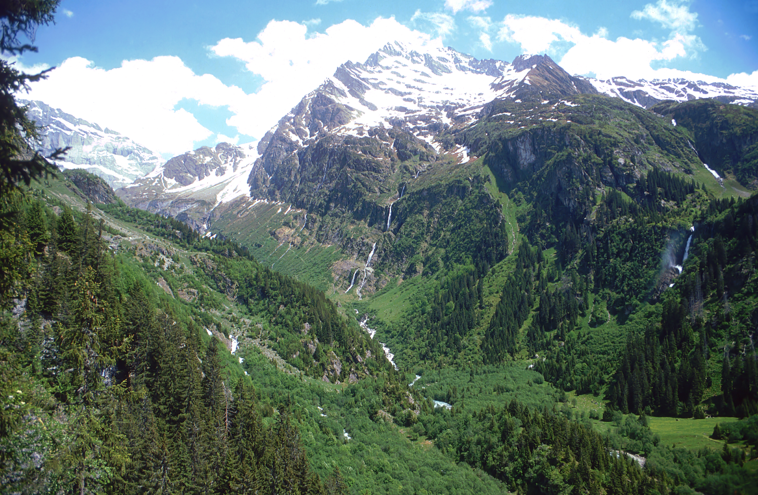 Maderanertal - Talende mit Blick auf den Gross Düssi hinter dem Berghotel Maderanertal, Balmenegg; Kanton Uri/Zentralschweiz